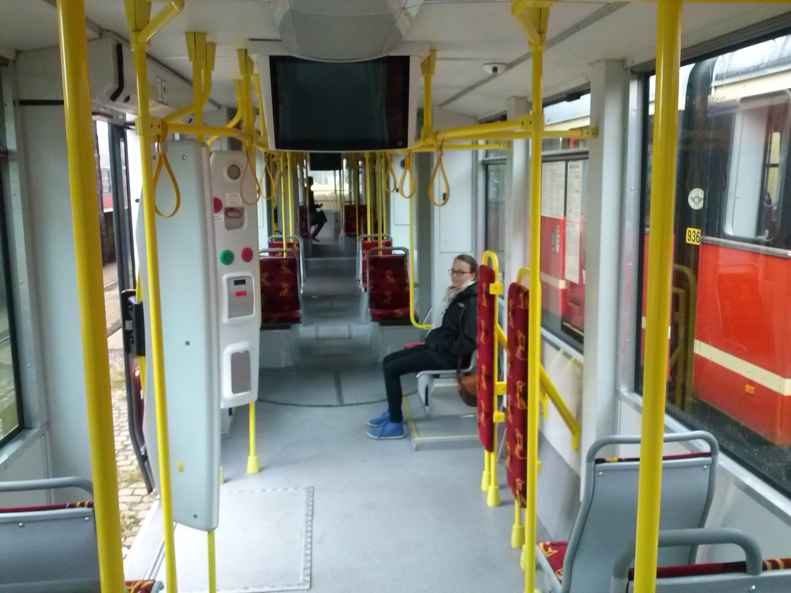 Alstom Citadis 100 - wnętrze po modernizacji (widok w tył)